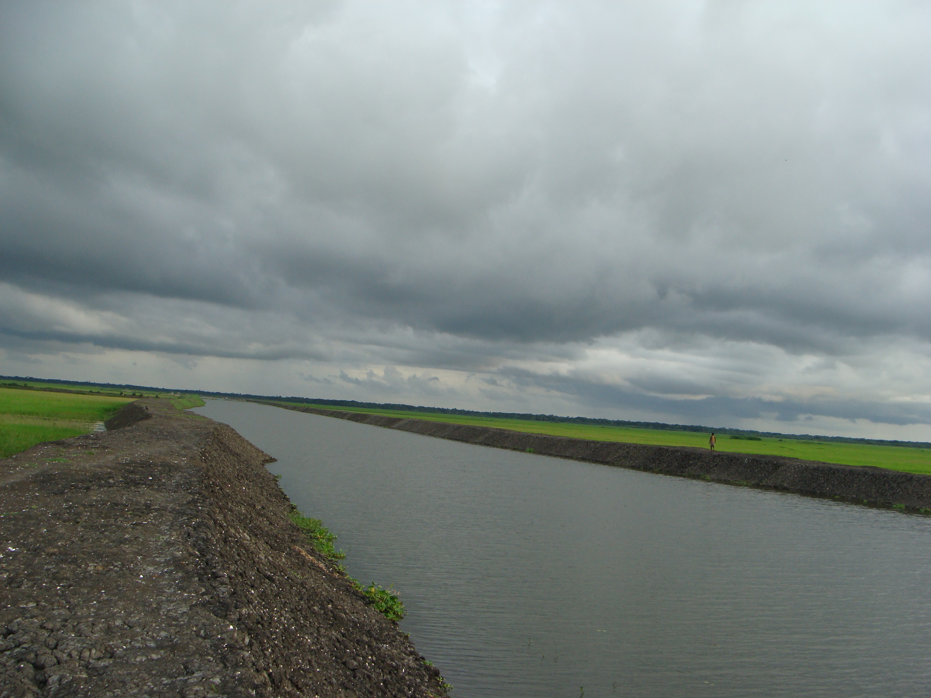 Mukteshwari River, Avaynagar , jessore, Bangladesh